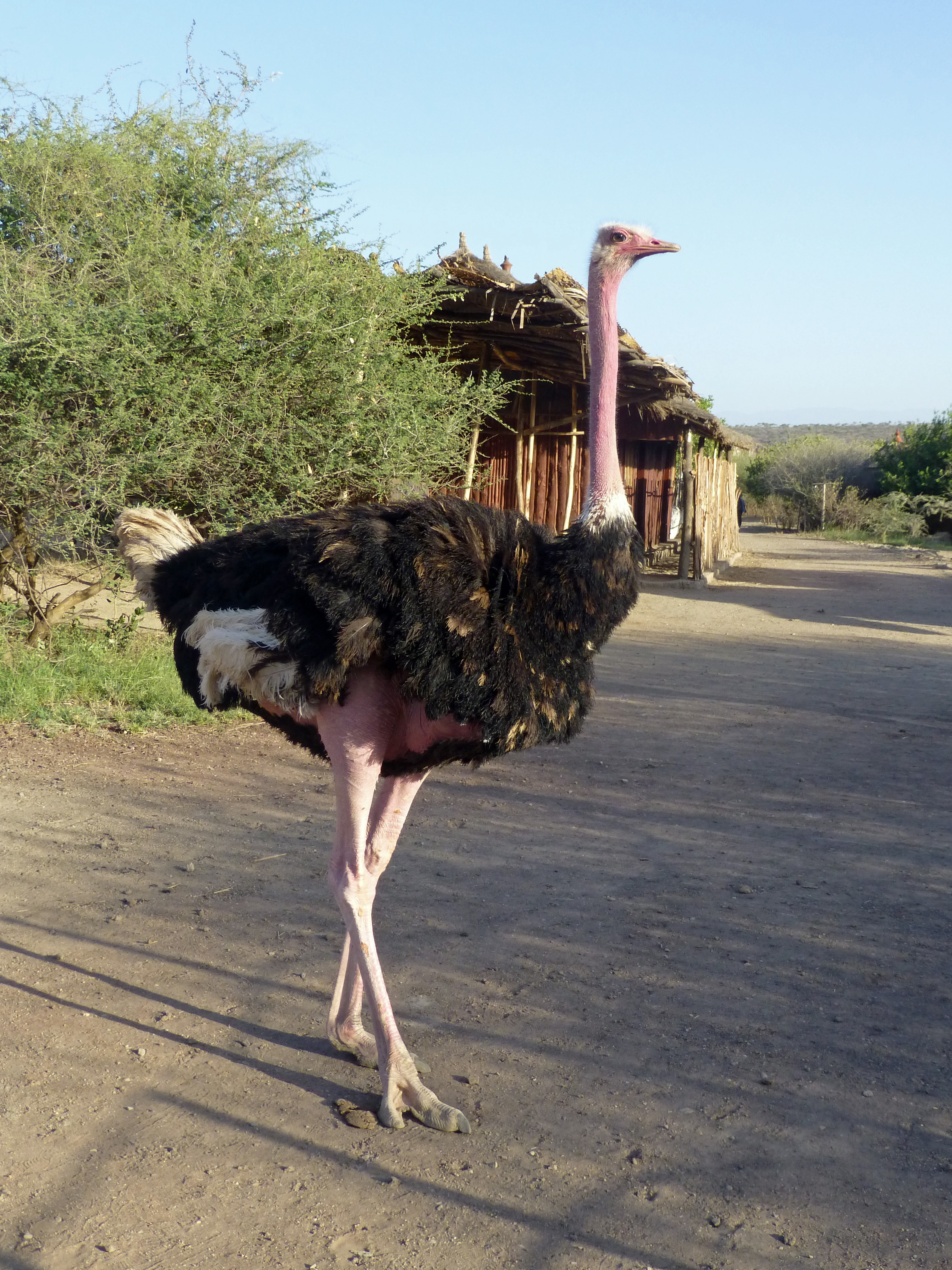 Autruche au Parc national d'Awash (Ethiopie)